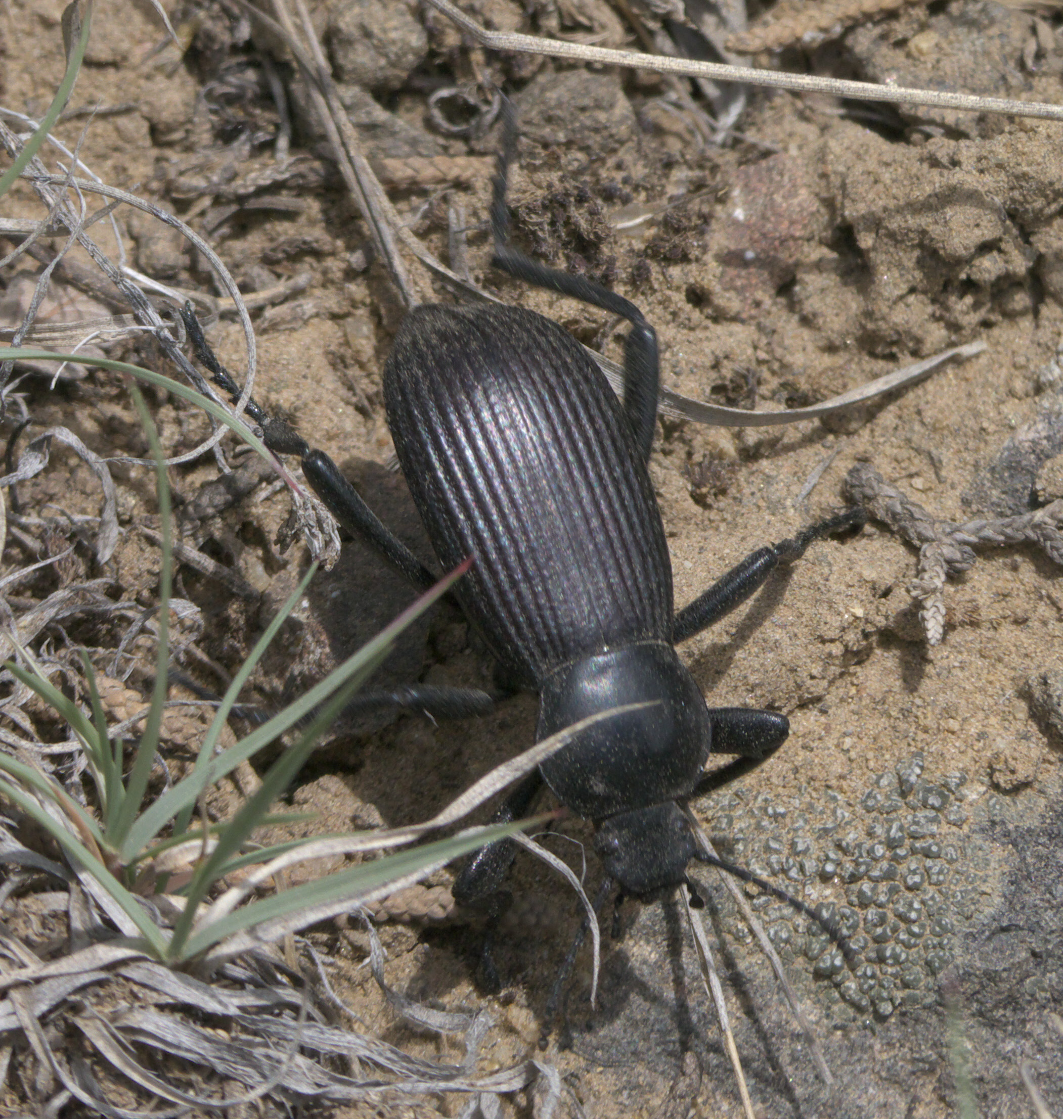 Eleodes obscurus, pinacate beetle, ID Confidence: 92